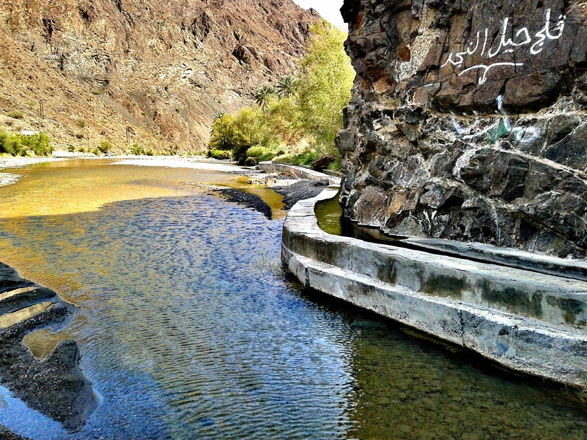 فلج حيل النجد بلدة الوقبة بشمال ولاية ينقل سلطنة عمان